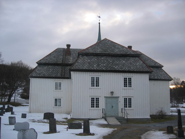 Evenes kirke i Evenes